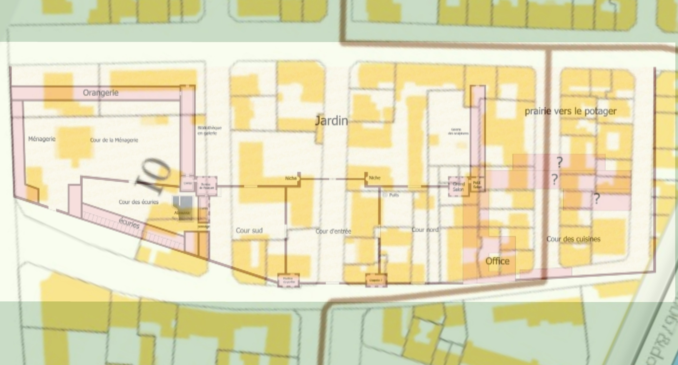 Superposition de l'ancienne propriété avec le cadastre actuel